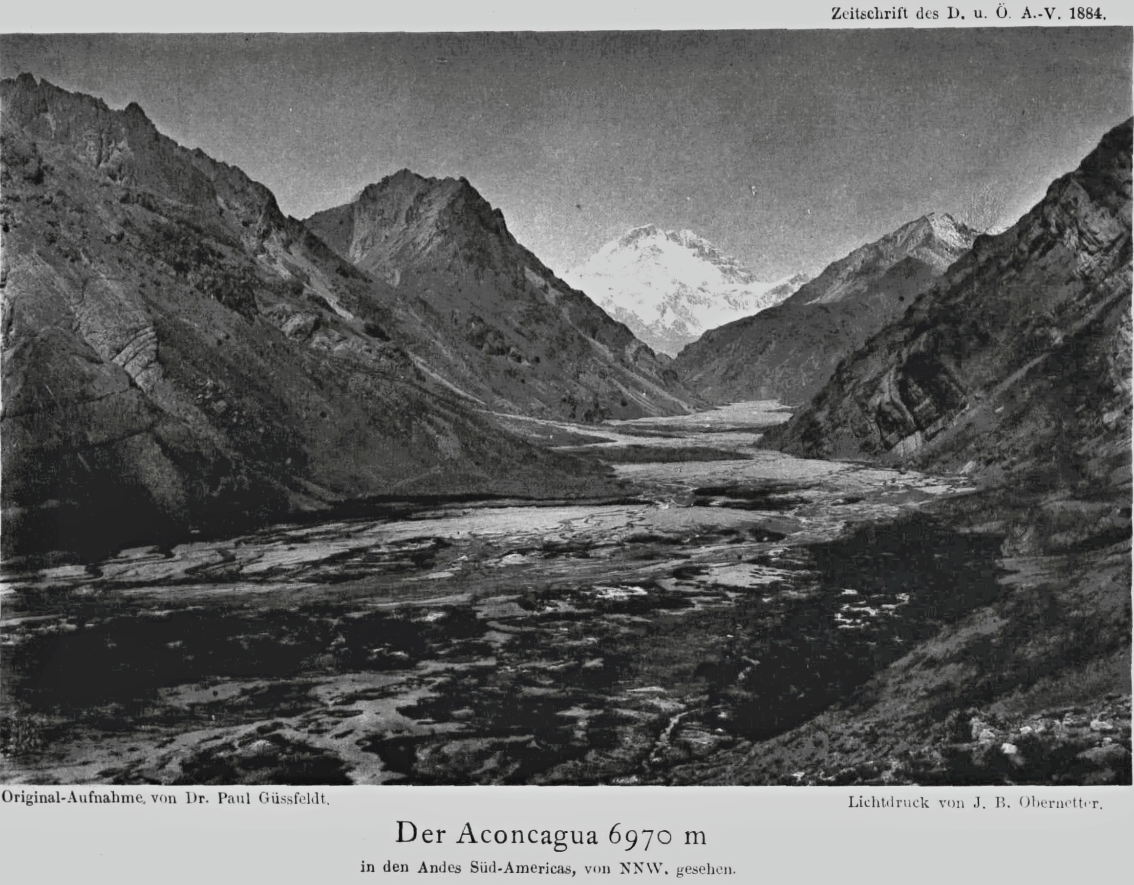 Der Aconcagua 6970 m aus Zeitschrift des Deutschen und Oesterreichischen Alpenvereins 1884 Band 15